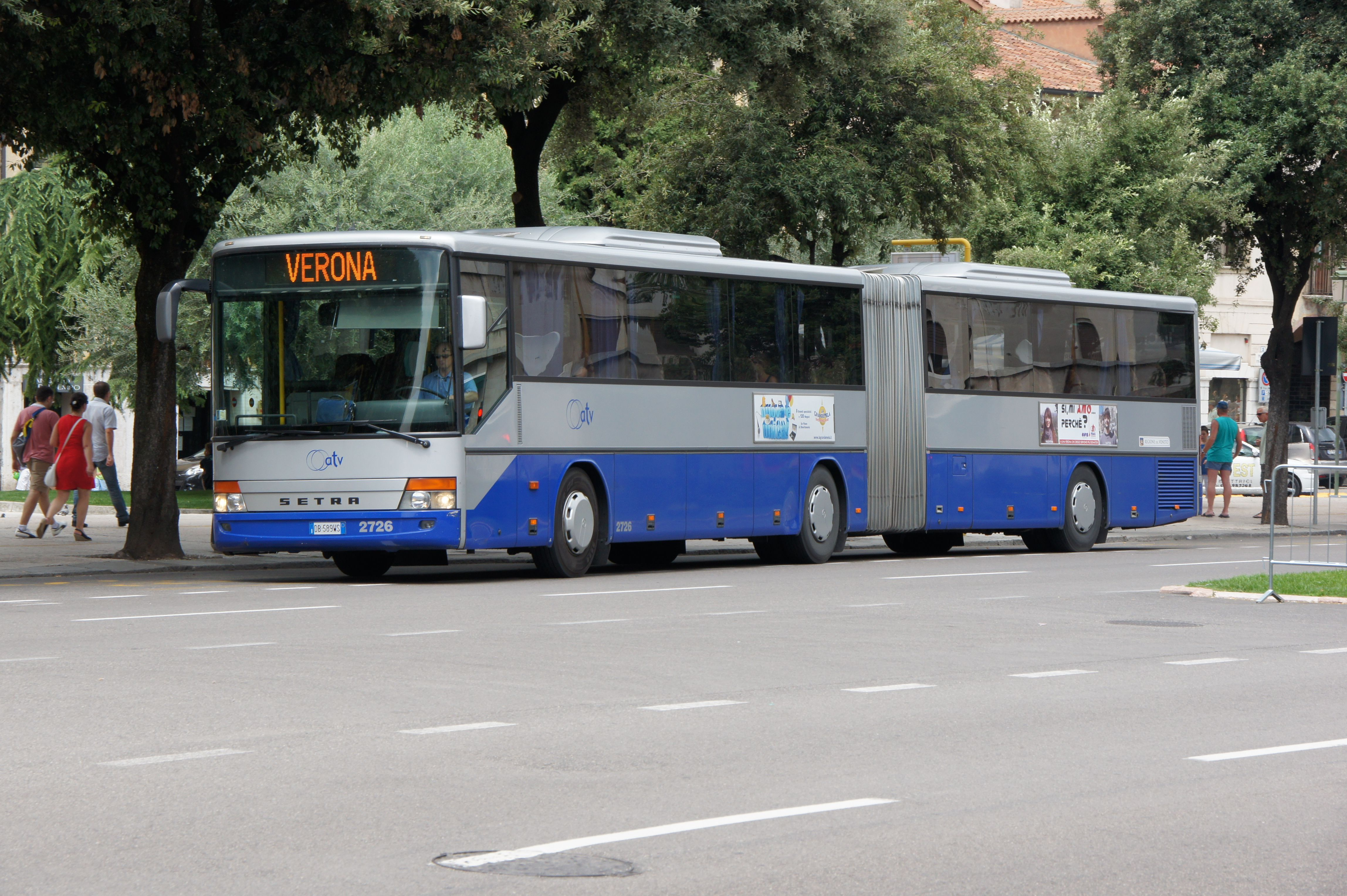 Autosnodato Setra nr. 2726 di ATV in sosta presso la fermata autobus di Corso Porta Nuova